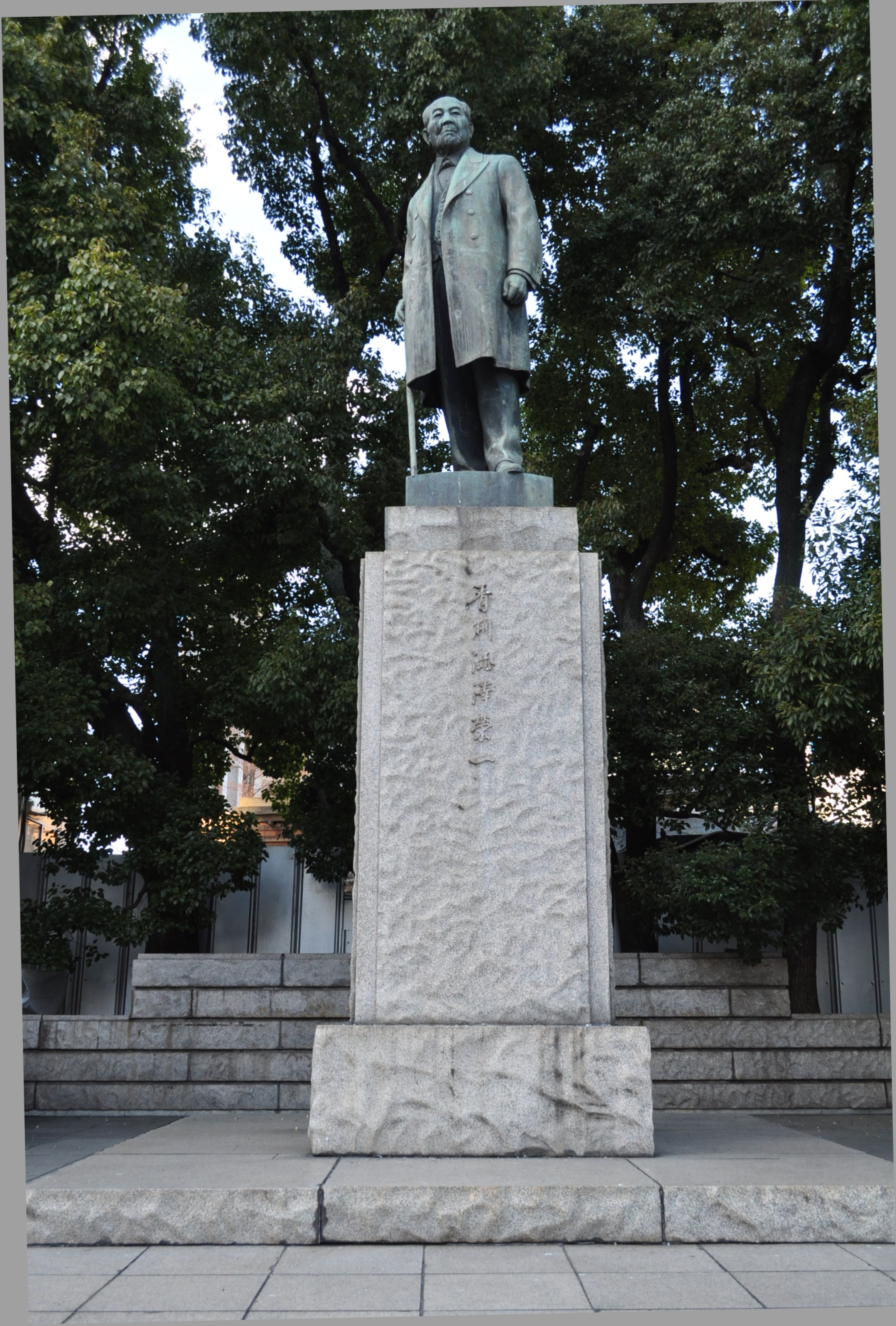 東京都千代田区大手町 渋沢栄一像